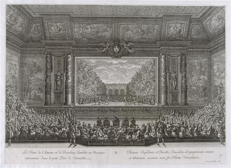 Les Fêtes de 1668 données par Louis XIV à Versailles, 1678, estampe, 30,5 cm x 42 cm, Musée national des châteaux de Versailles et de Trianon. -Inscription: Les Festes de l'Amour e de Bacchus, Comedie en musique representée dans le petit Parc de Versailles.